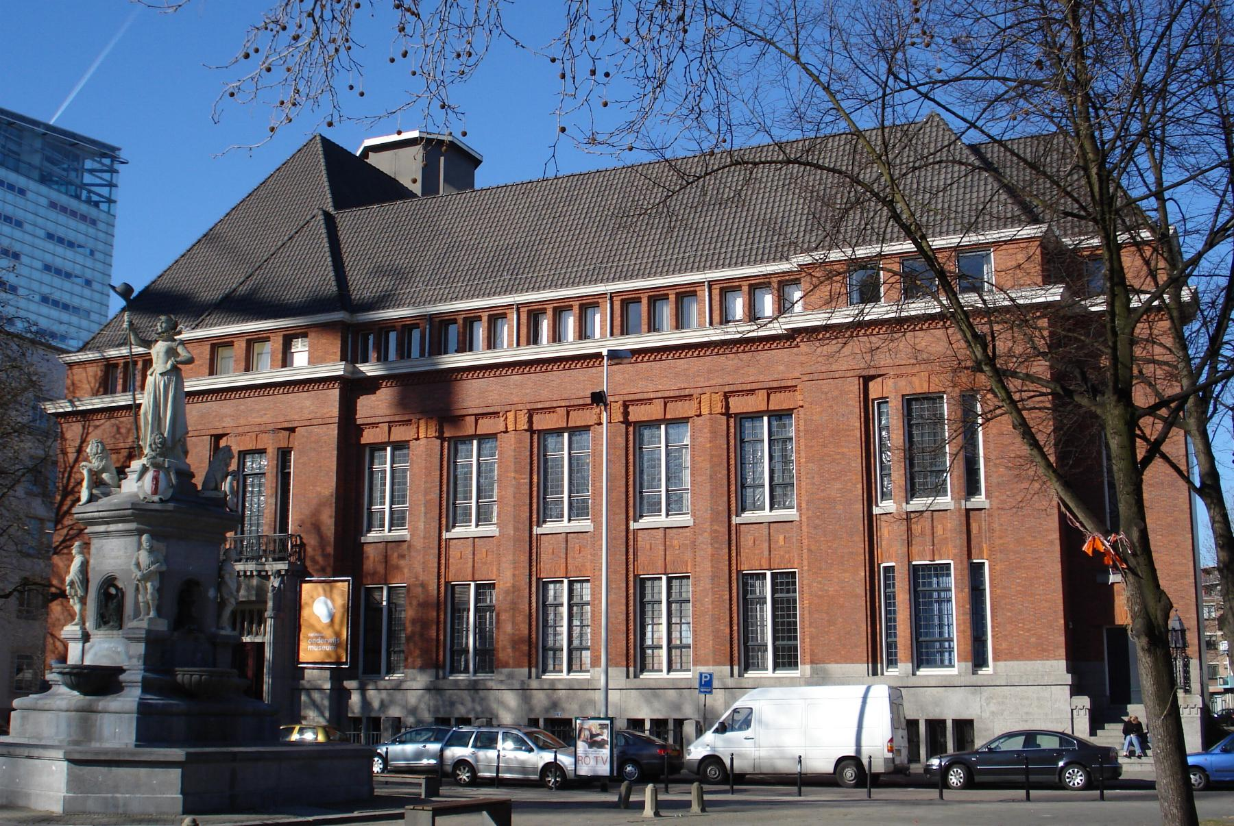 Rotterdam, Nieuwe MArkt. Nationaal Onderwijsmuseum. Gemeentemonument.